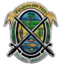 Brasão do Município de Bacabal - MA